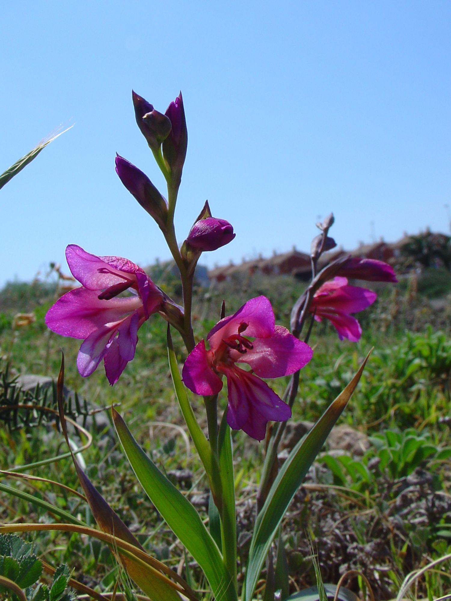 Gladiolus illyricus from Cabo de Palos, Murcia, Spain